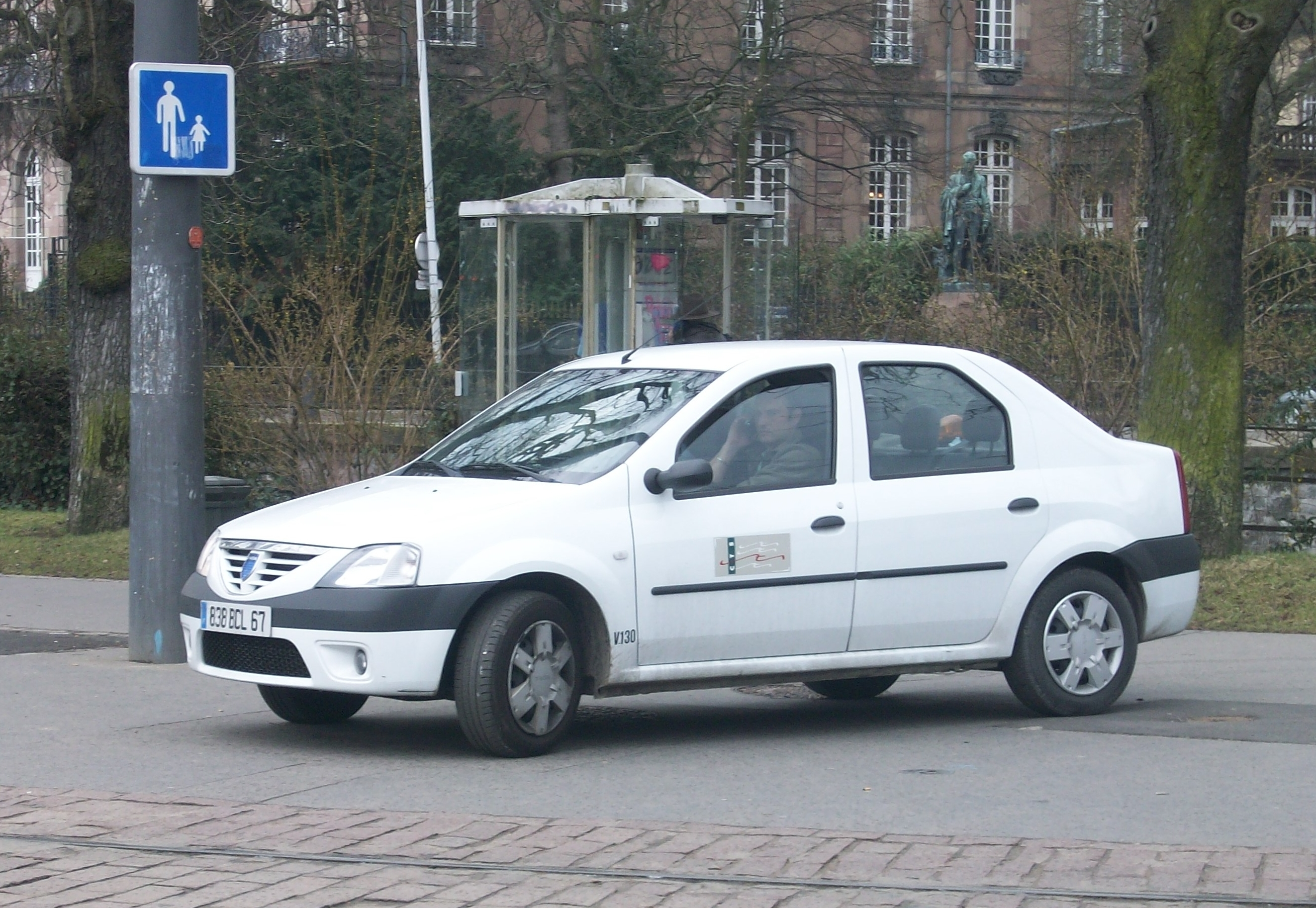 Véhicule d'intervention des agents de prévention du réseau tram-bus de Strasbourg